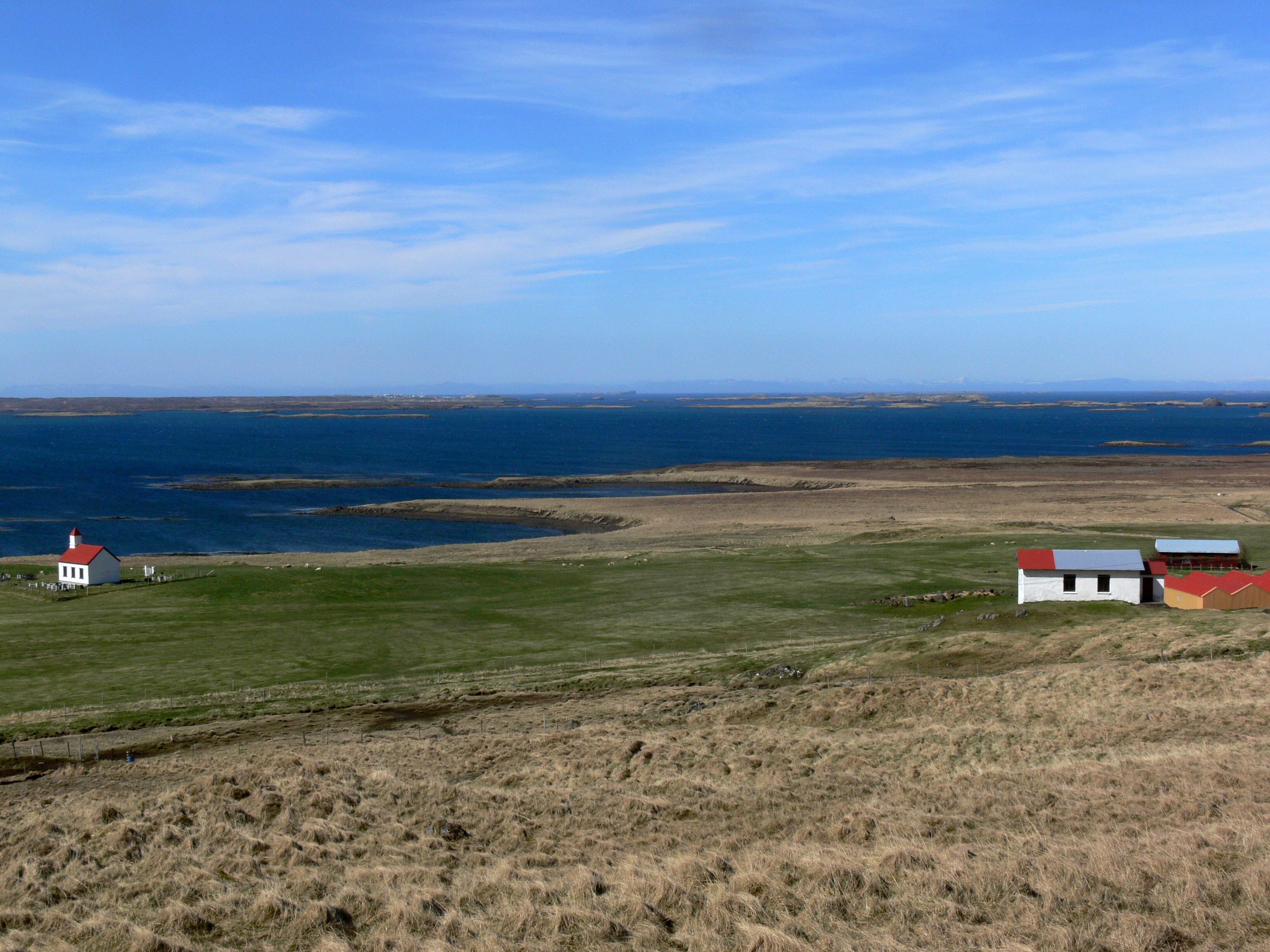 Inseln am Breiðasund im Breiðafjörður